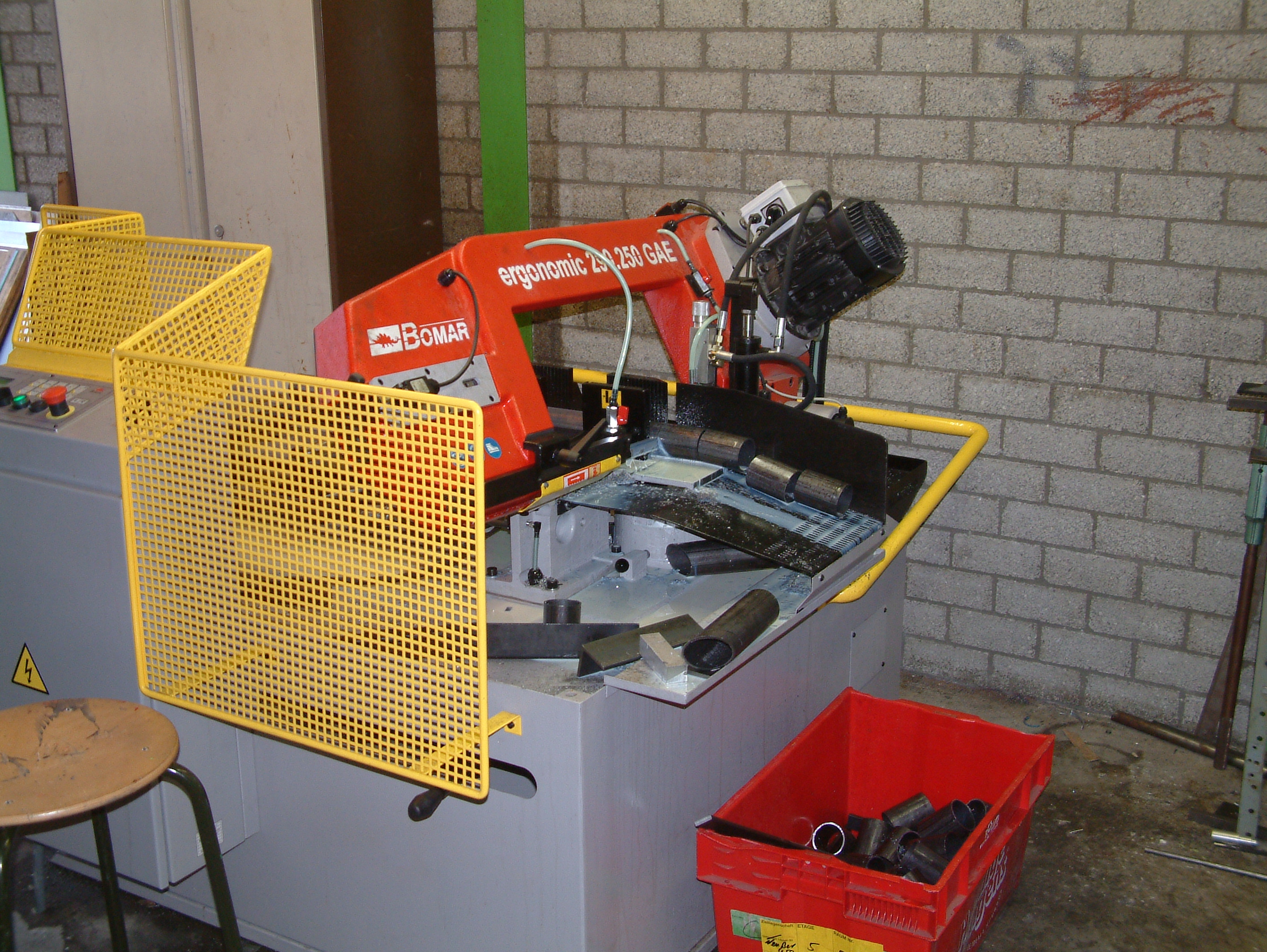 Zaagmachine van het VMBO van het Oranje Nassau College, Zoetermeer, vestiging Clauslaan